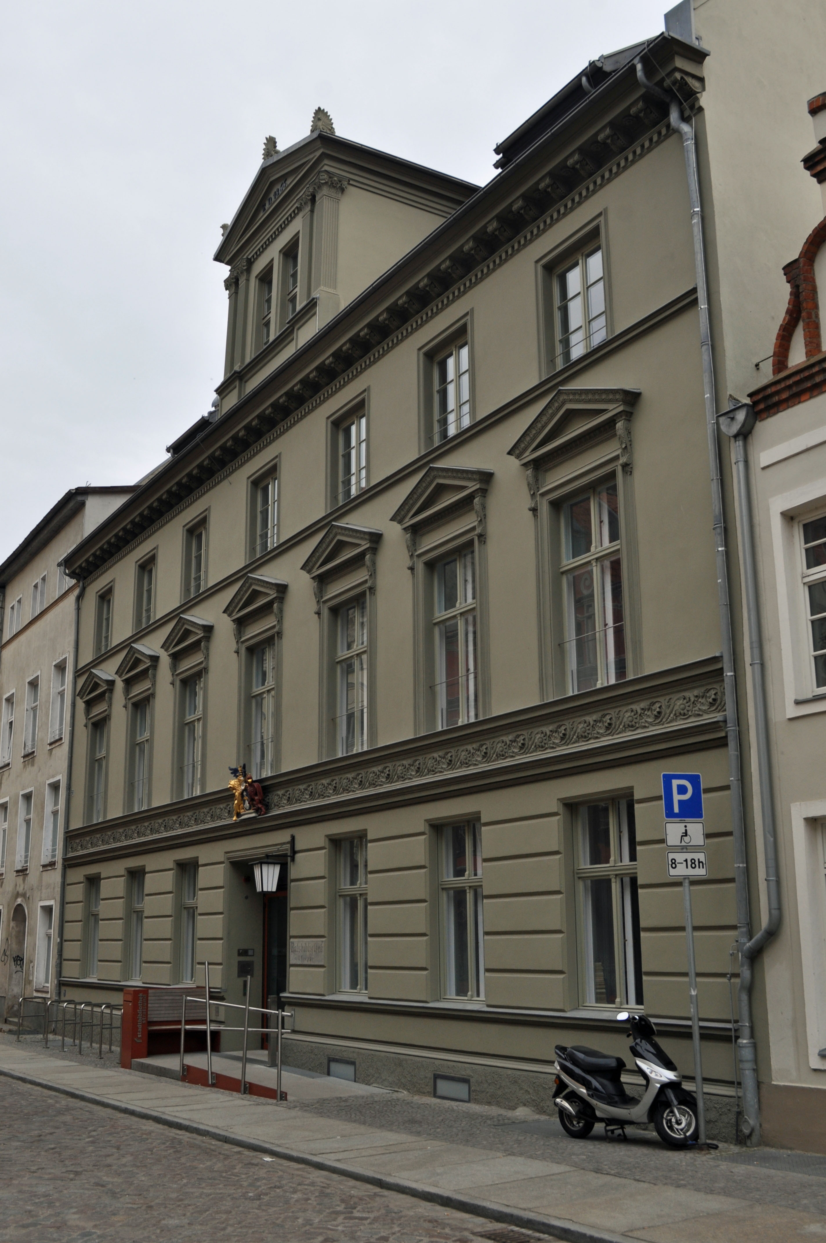 Gebäude bzw. Gebäudedetail in Stralsund. Straße und Hausnummer siehe Dateiname.